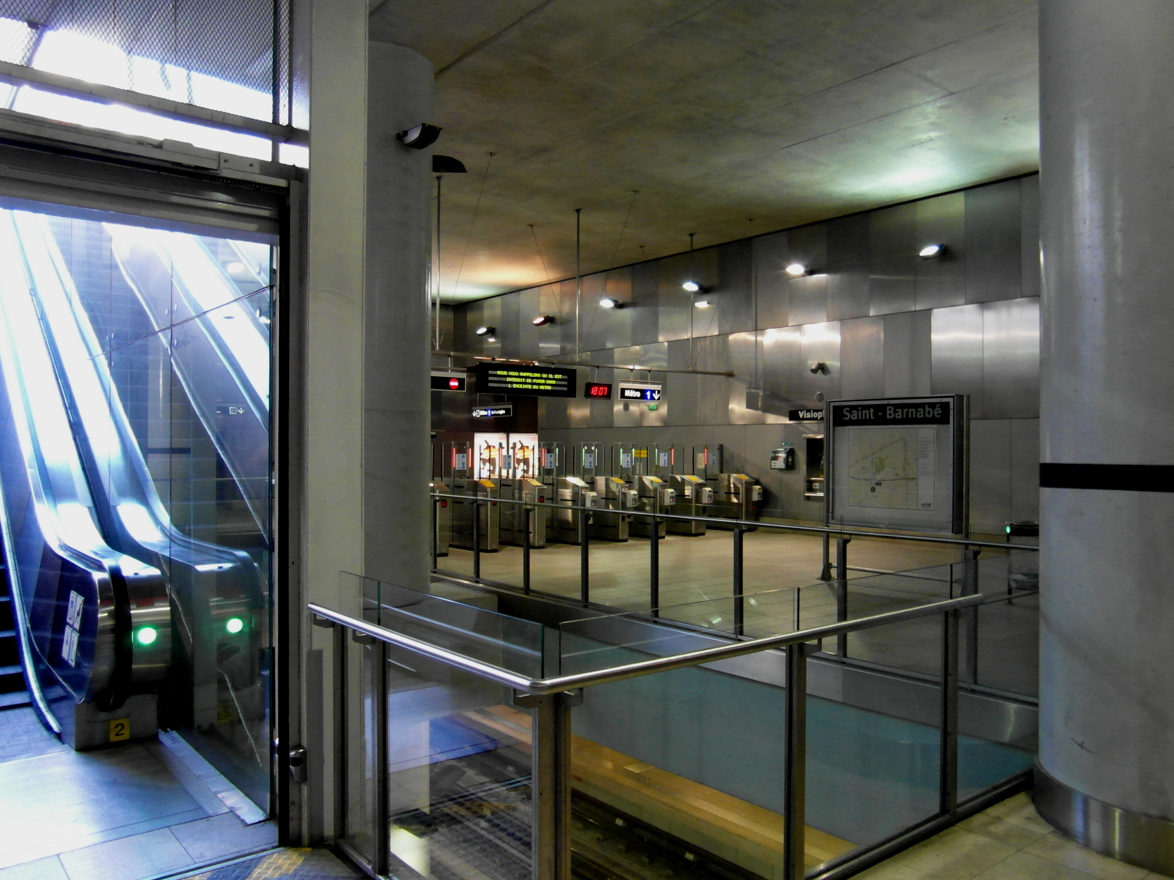 Marseille - Métro - Saint-Barnabé